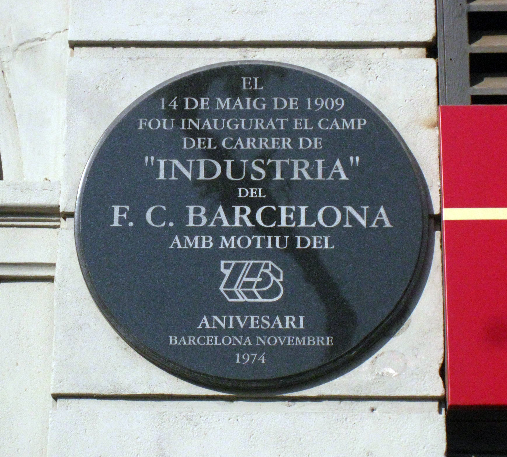 Camp del Barça del C. Indústria. C. Comte Urgell, 252 (Barcelona)